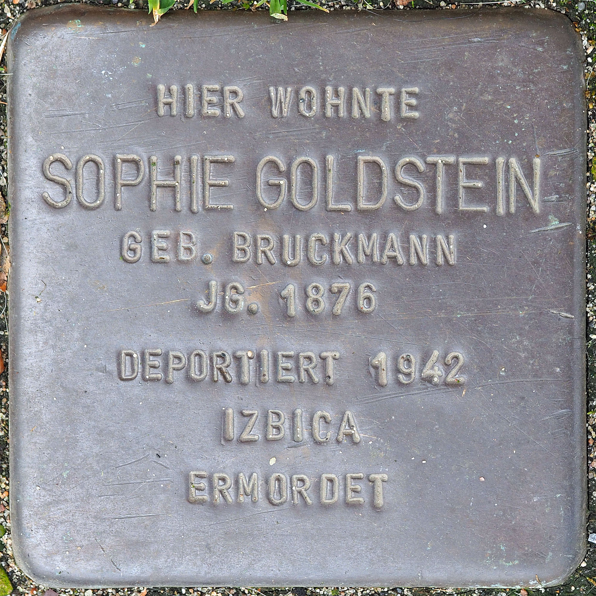 Stolpersteine MG: Goldstein, Sophie